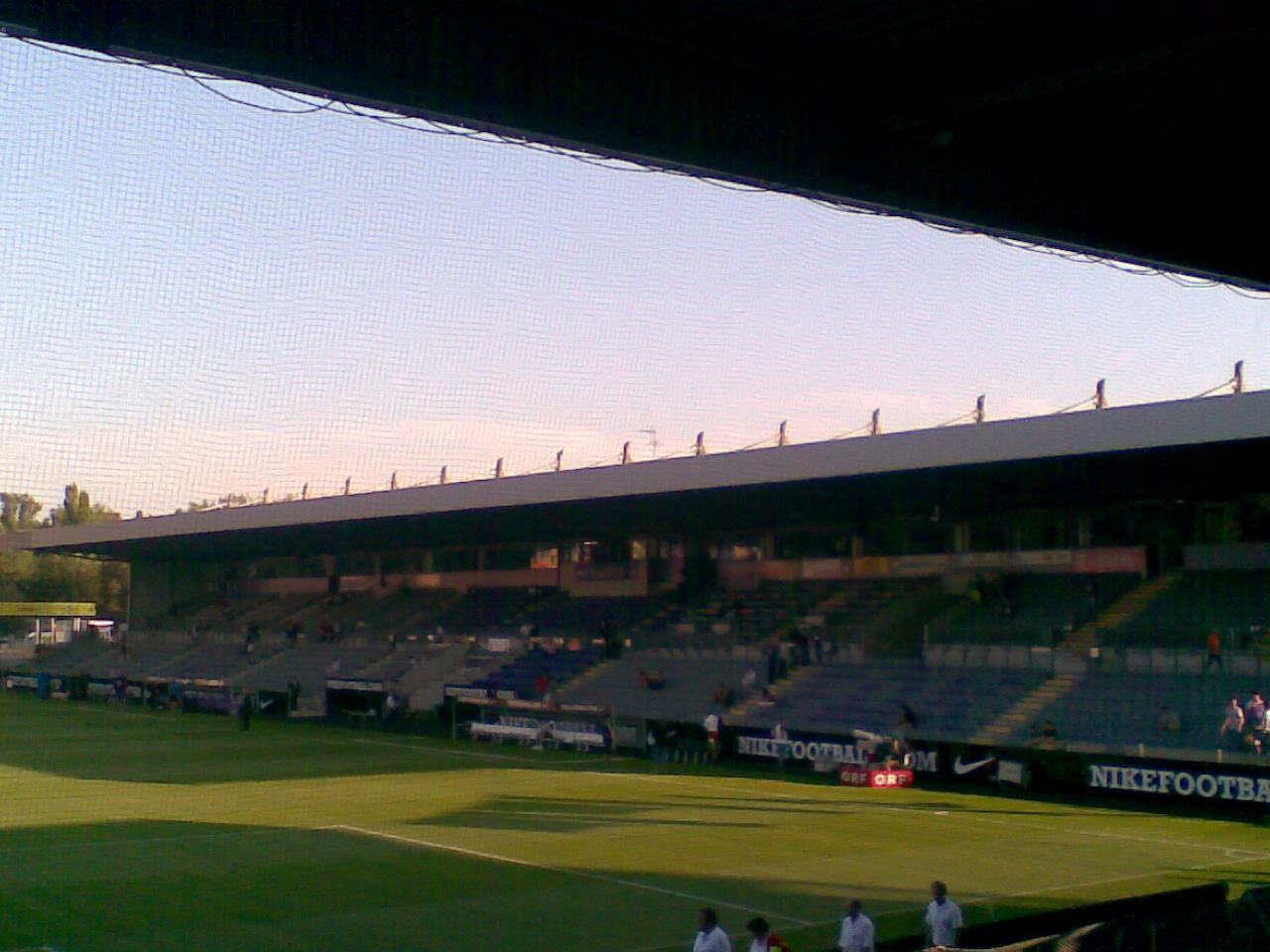 Die Südtribüne